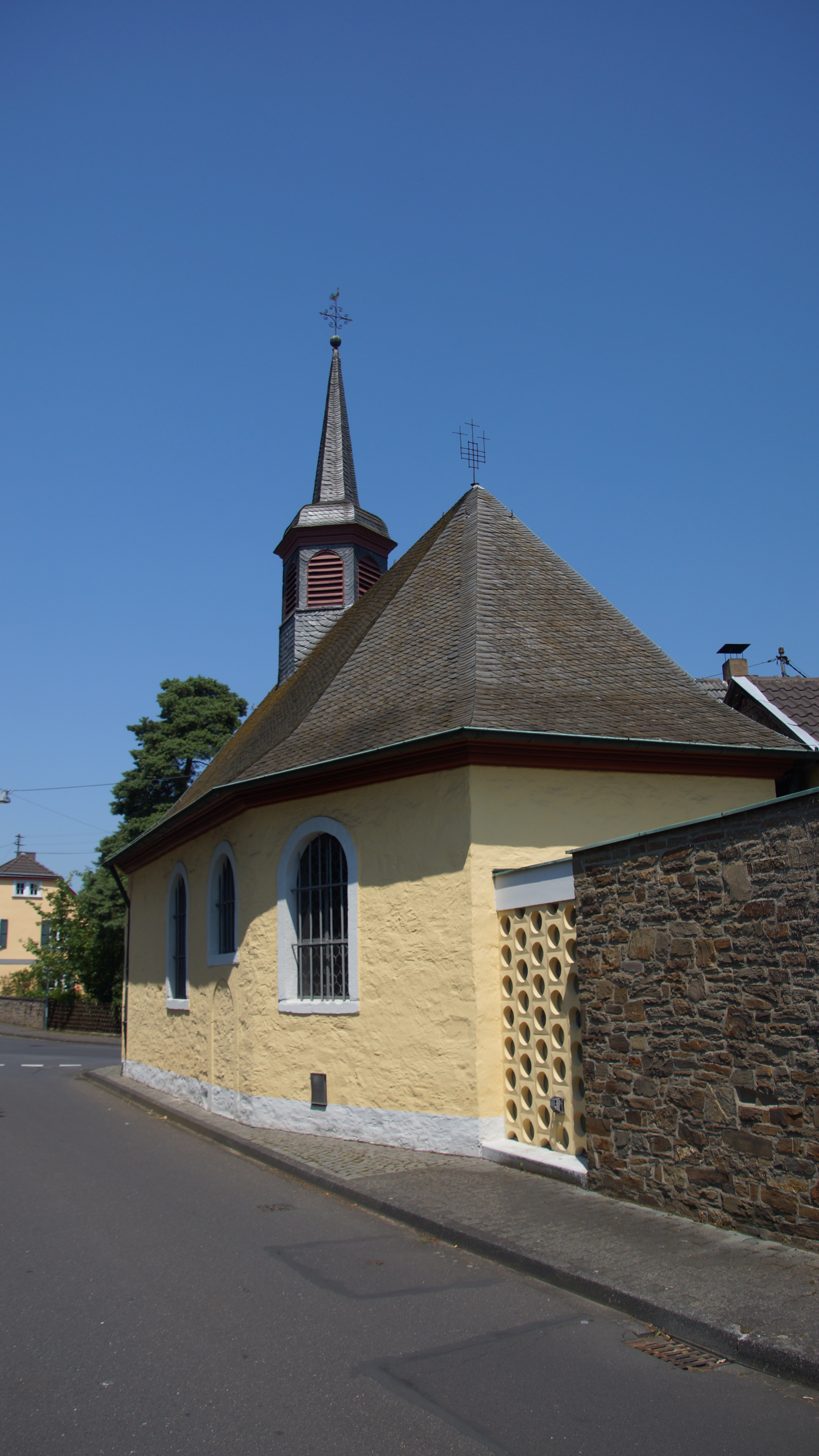 katholische Kapelle St. Sebastian in Unkel-Heister, Sebastianstraße